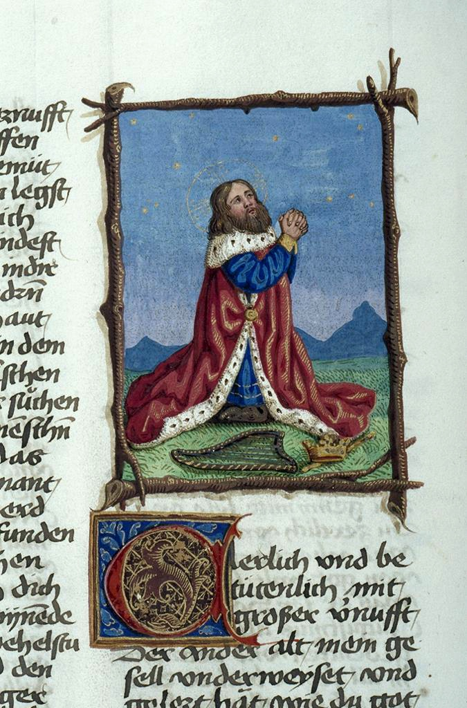 Princeton Garret 134: Otto von Passau